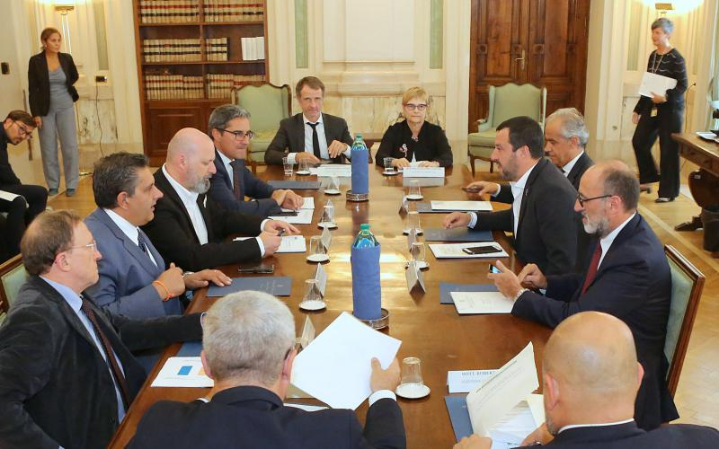 Delegazione conferenza regioni incontra ministro Salvini 1